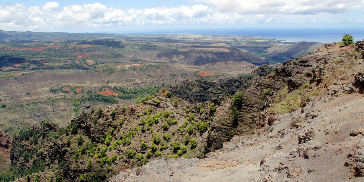 Иллюстрация для викиучебника Гавайеведение